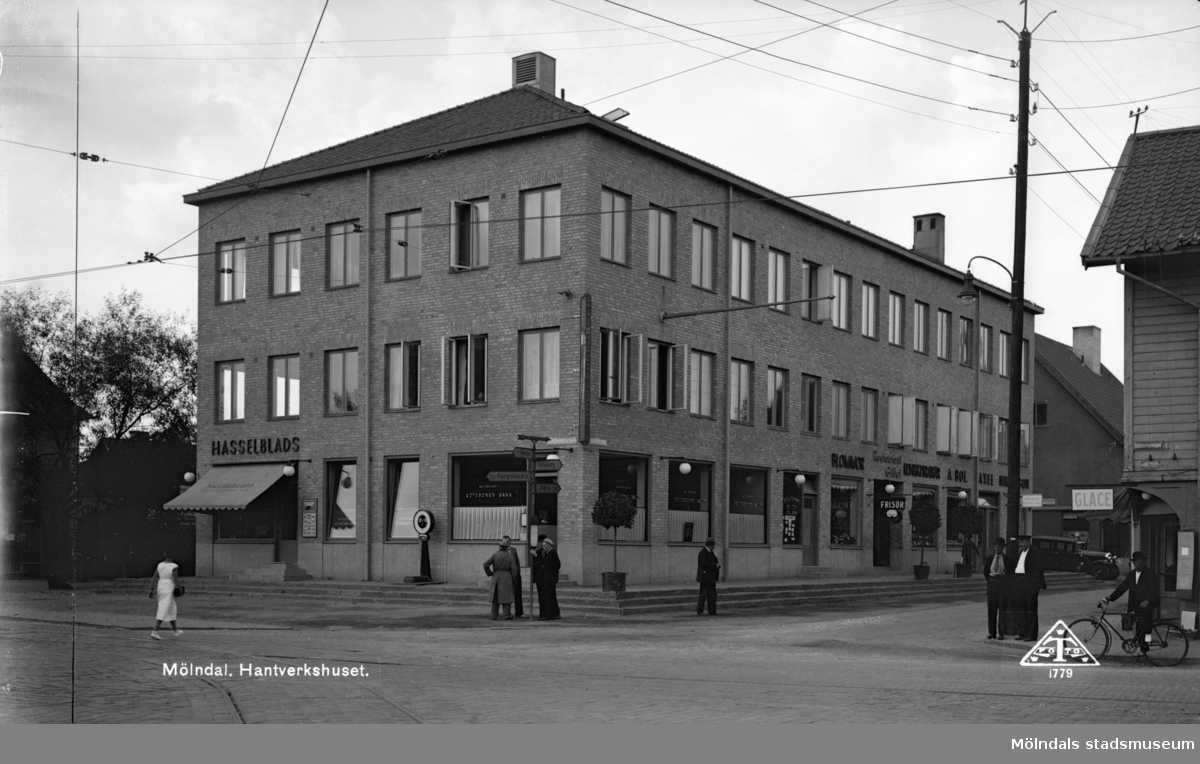 Hantverkshuset i Mölndal. Fasader mot Kungsbackavägen och Frölundagatan. Vy från Göteborgsvägen. Fotografi använt till vykortstillverkning. Fotograferat 1930-1950.